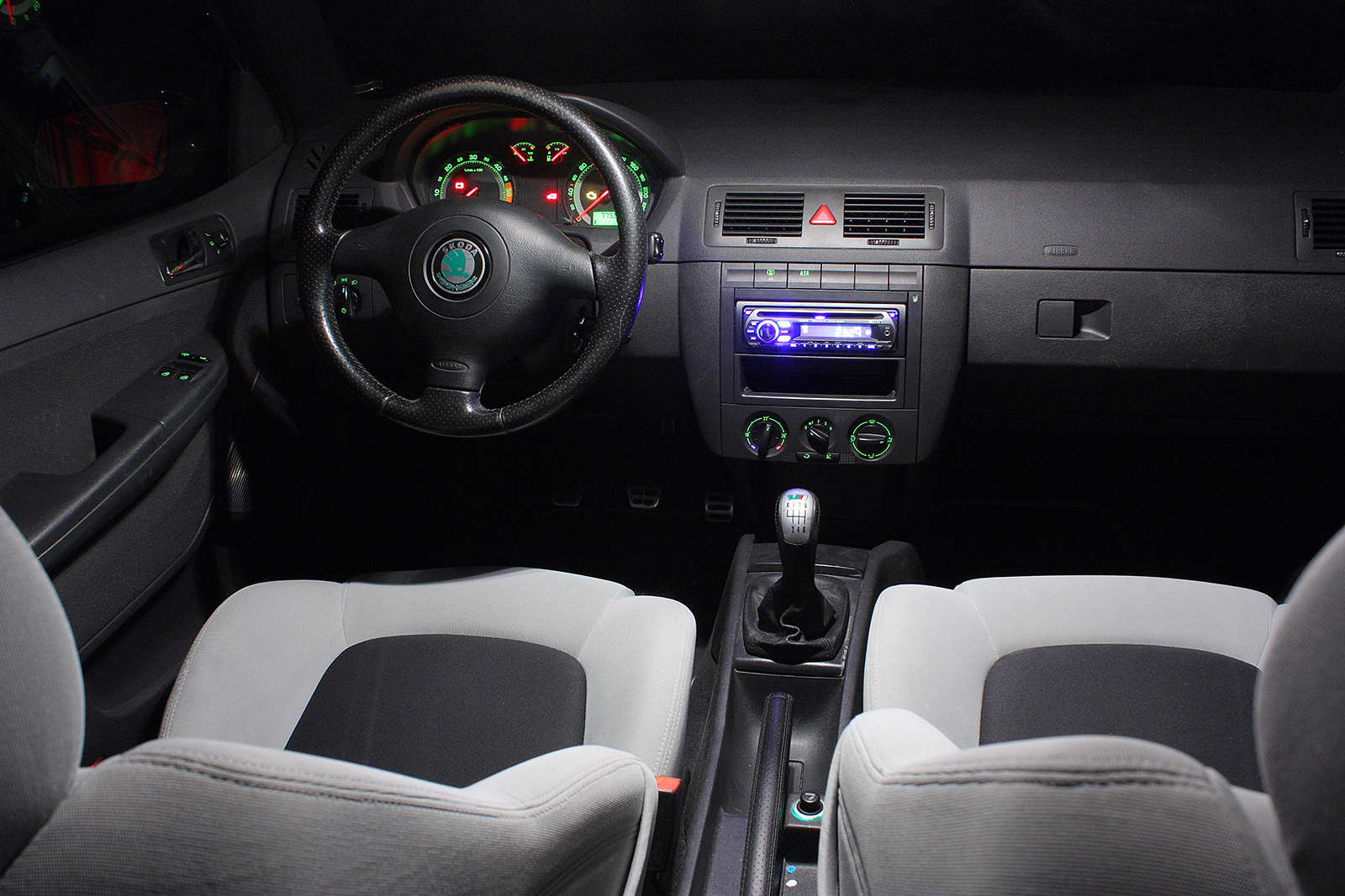 Skoda Fabia RS